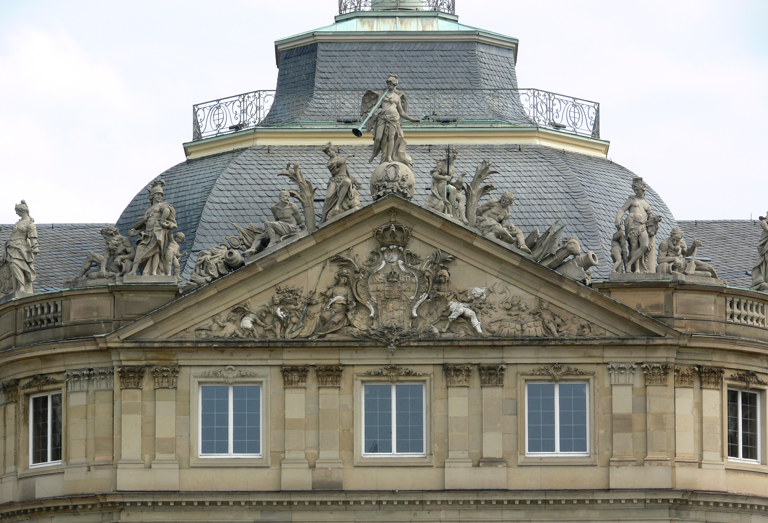 Stuttgart, Neues Schloss, mittlerer Giebel am Ehrenhof